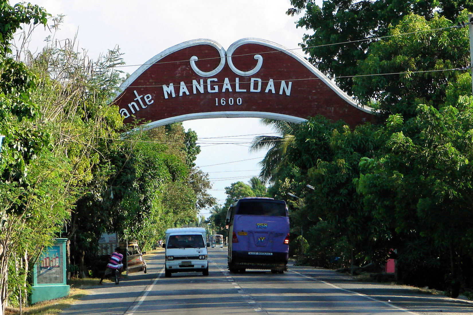 Mangaldan, Pangasinan, Philippines